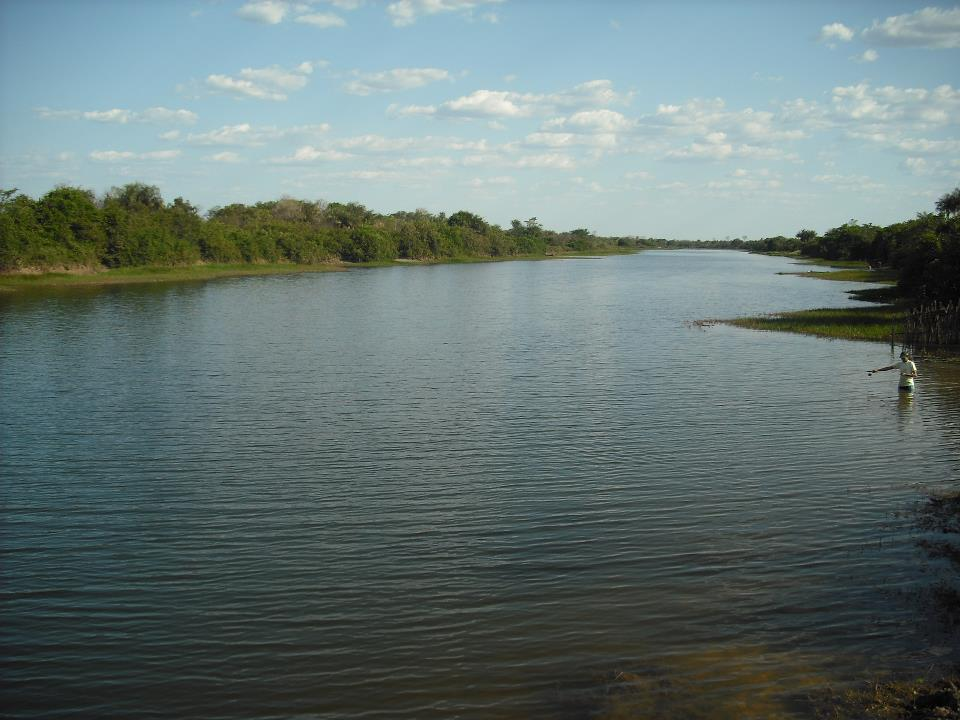 Rio Marataoan, localizado na cidade de Barras Piauí.